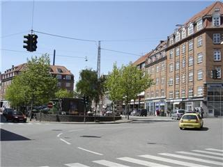 Vesterbro Torv Århus